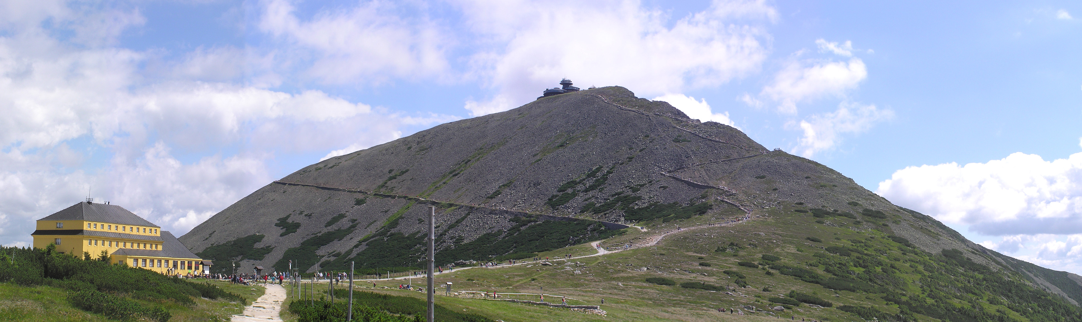 Vrchol Sněžky směrem od Obřího dolu.